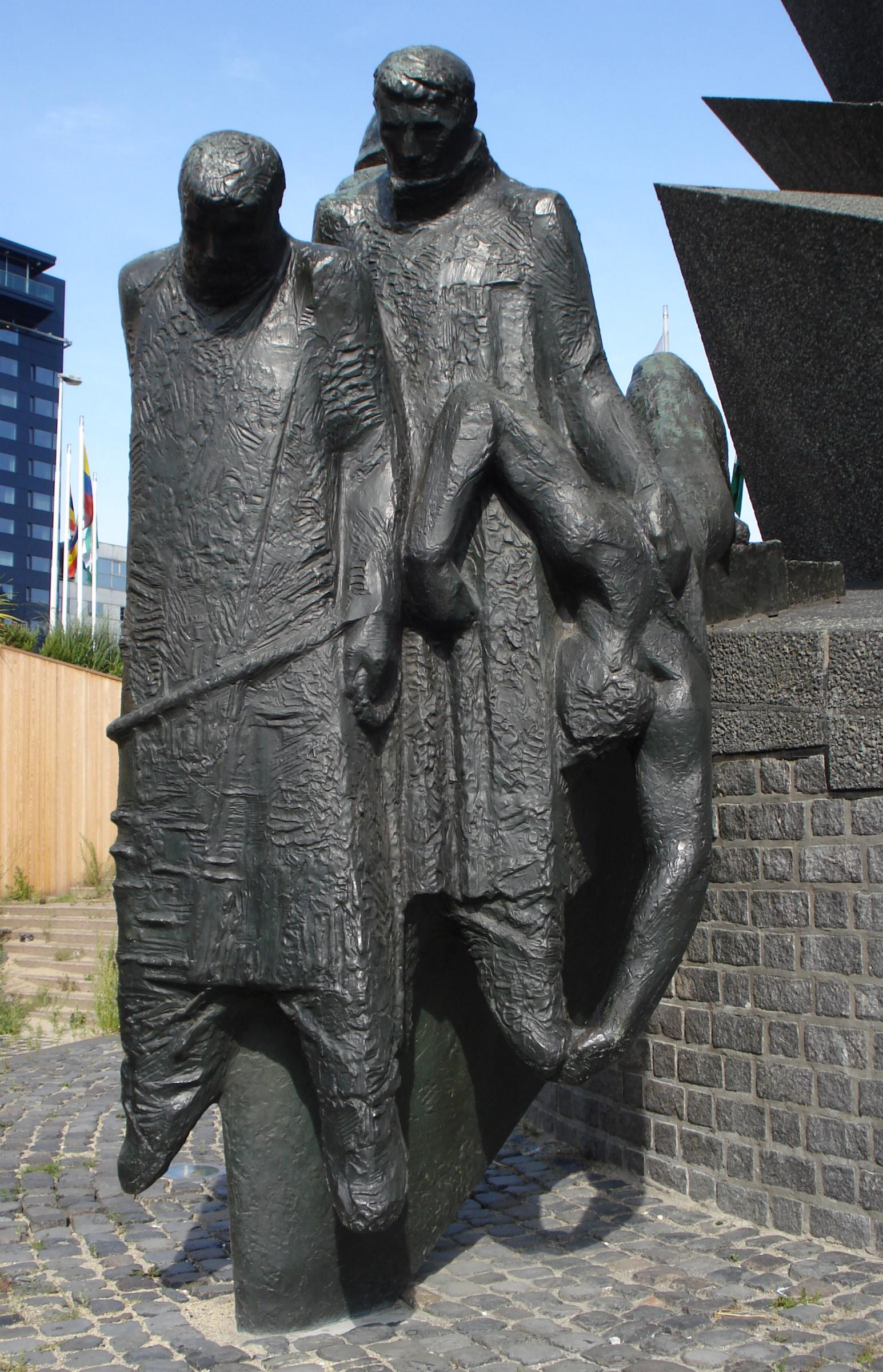 Rotterdam, Leuvehaven. Kunstwerk De Boeg van Fred Carasso. Rotterdam/The Netherlands.